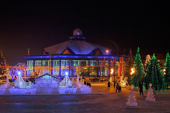 La cirko en Tjumeno (Rusio)